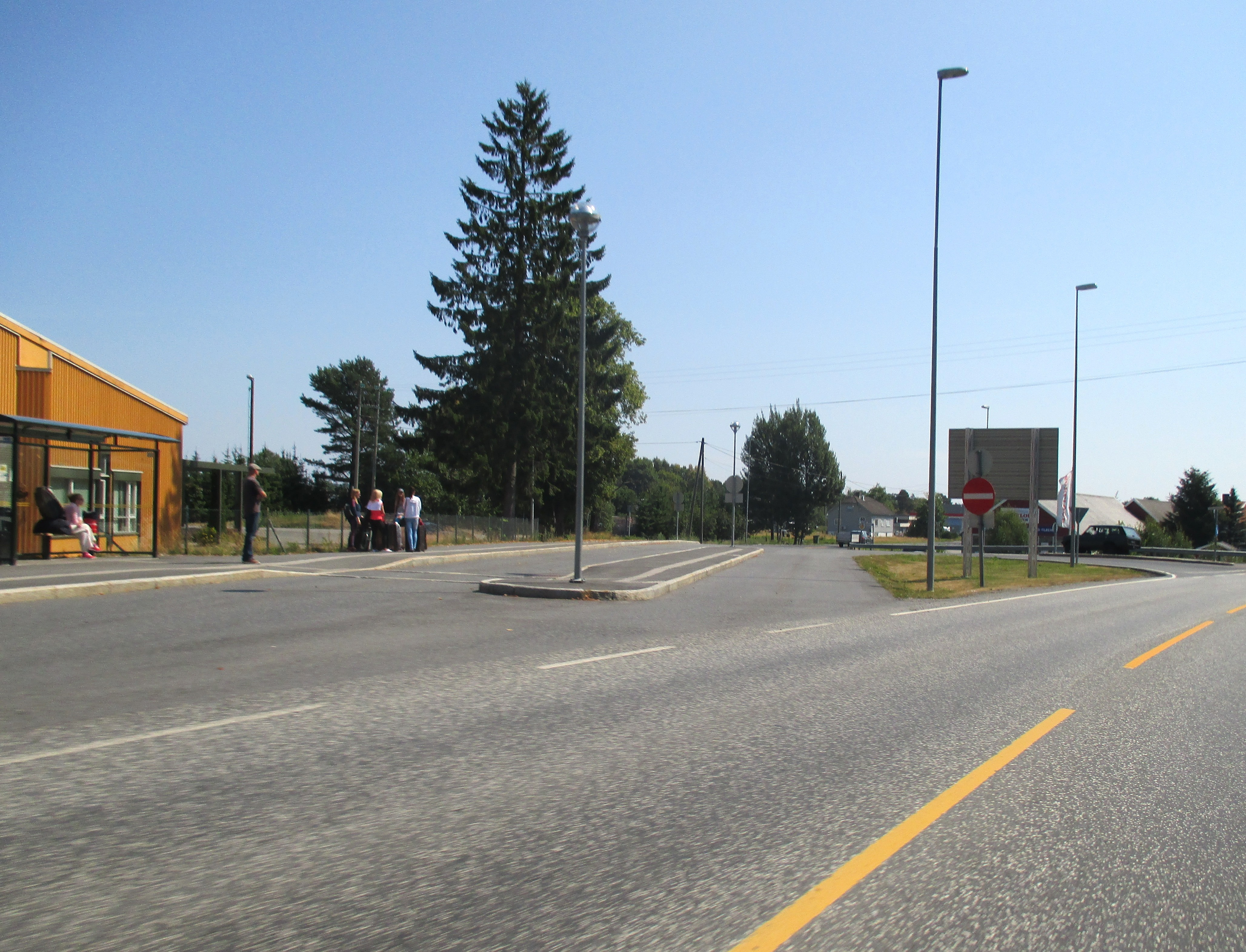 Lillesandsveien nedenfor Betania Grimstad er fylkesvei 48.